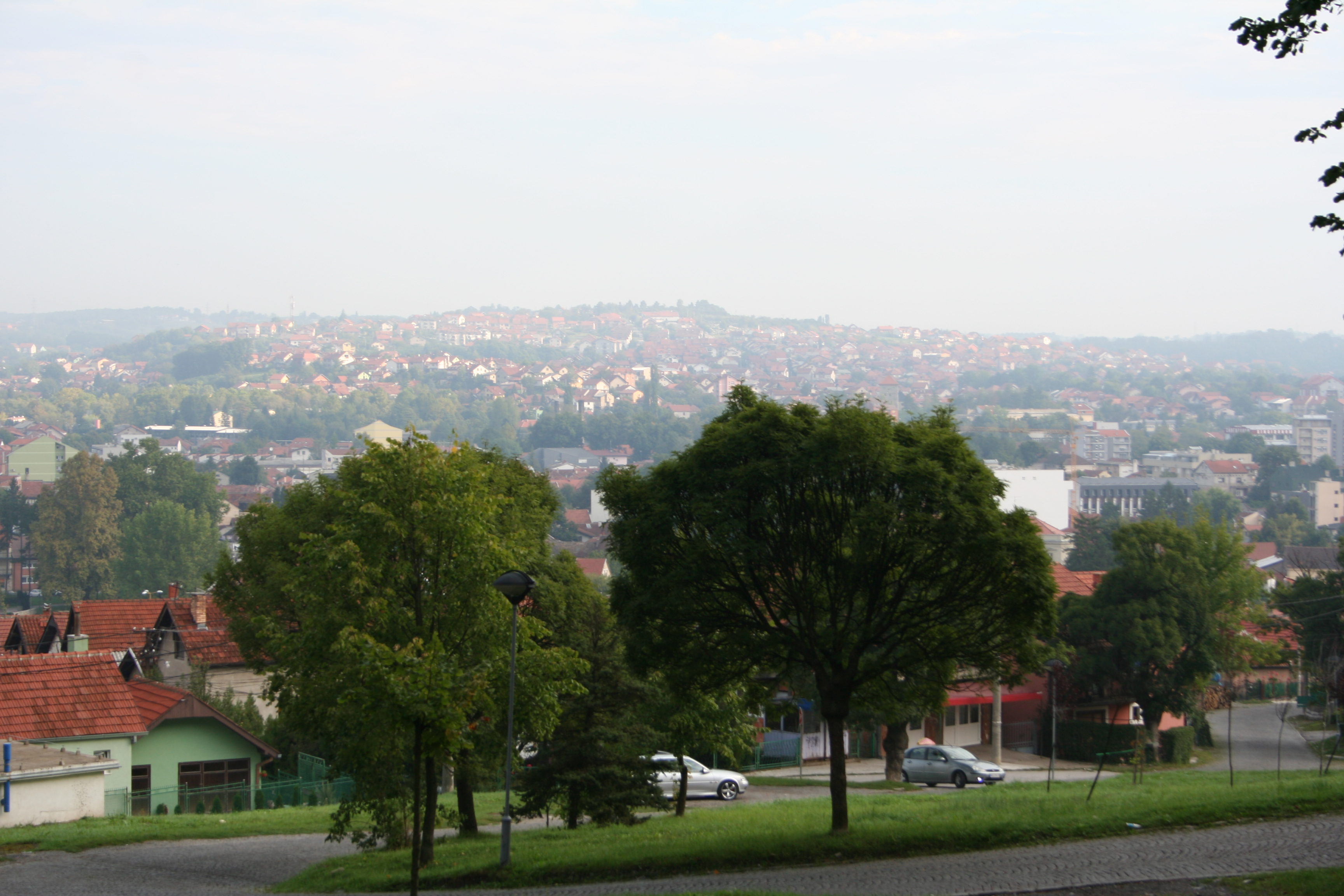 Spomenik borcima revolucije, Valjevo